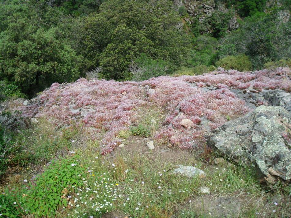 tapis de fleurs "Orpin bleuâtre" dans les gorges de Spelonca, en Corse du Sud